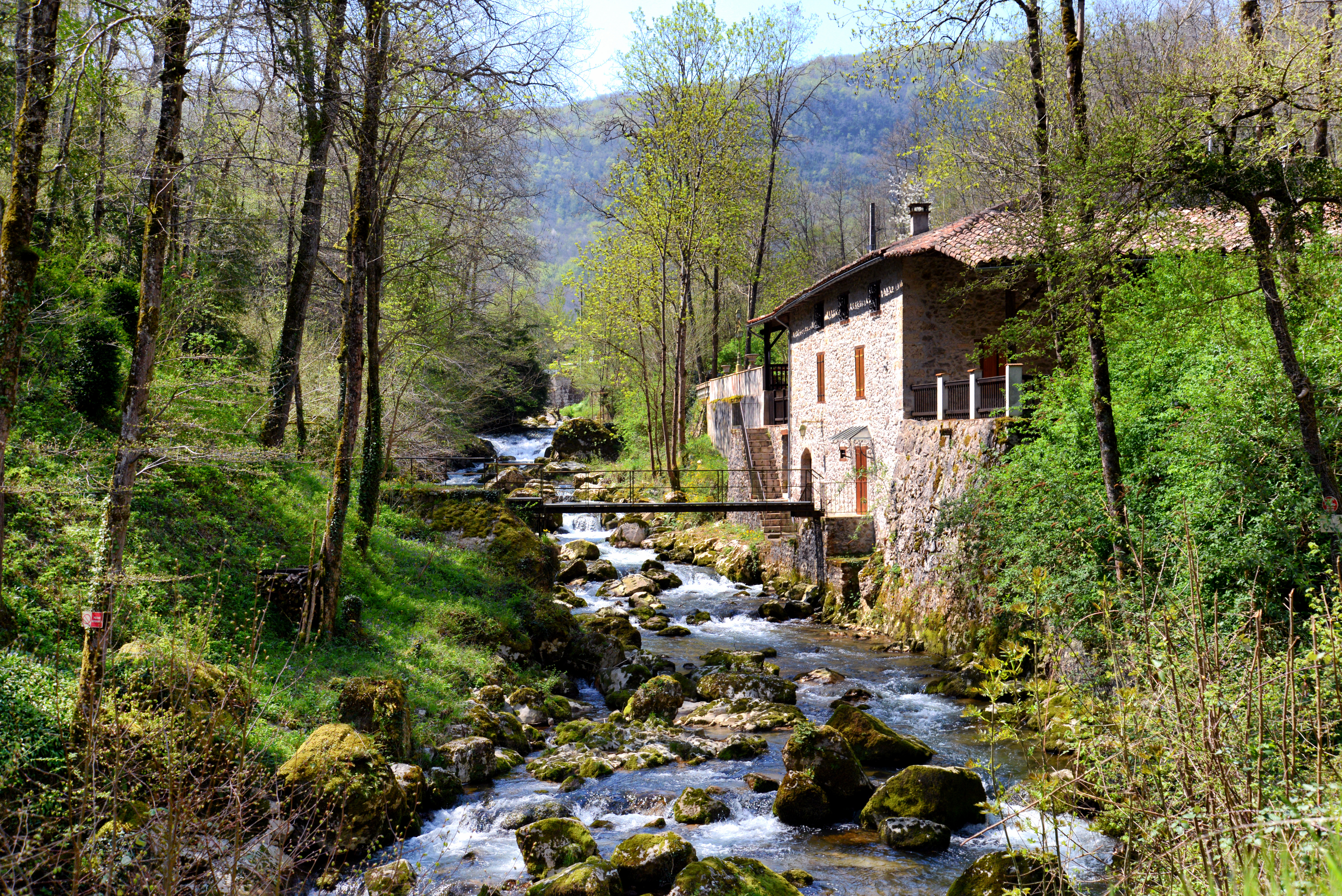 Ilhat, Ariège (Midi-Pyrénées) - La rivière Le Douctouyre à Rapy, longée par la route D1.